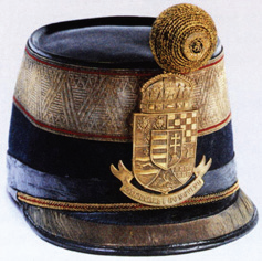 Tvrda kapa (čako) časnika kr. hrvatskog (hrvatsko-ugarskog) domobranstva, oko1878.